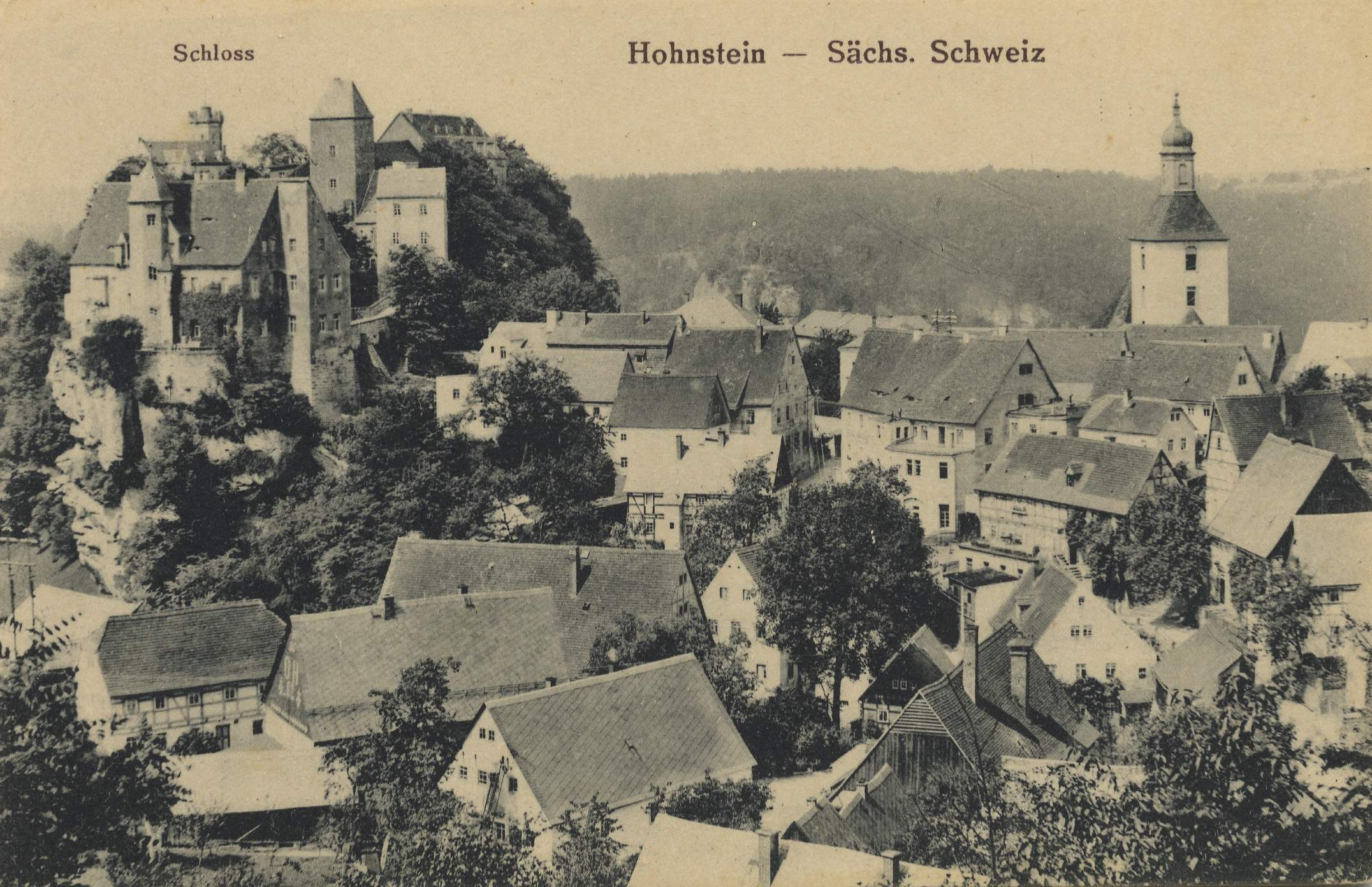 Schloss